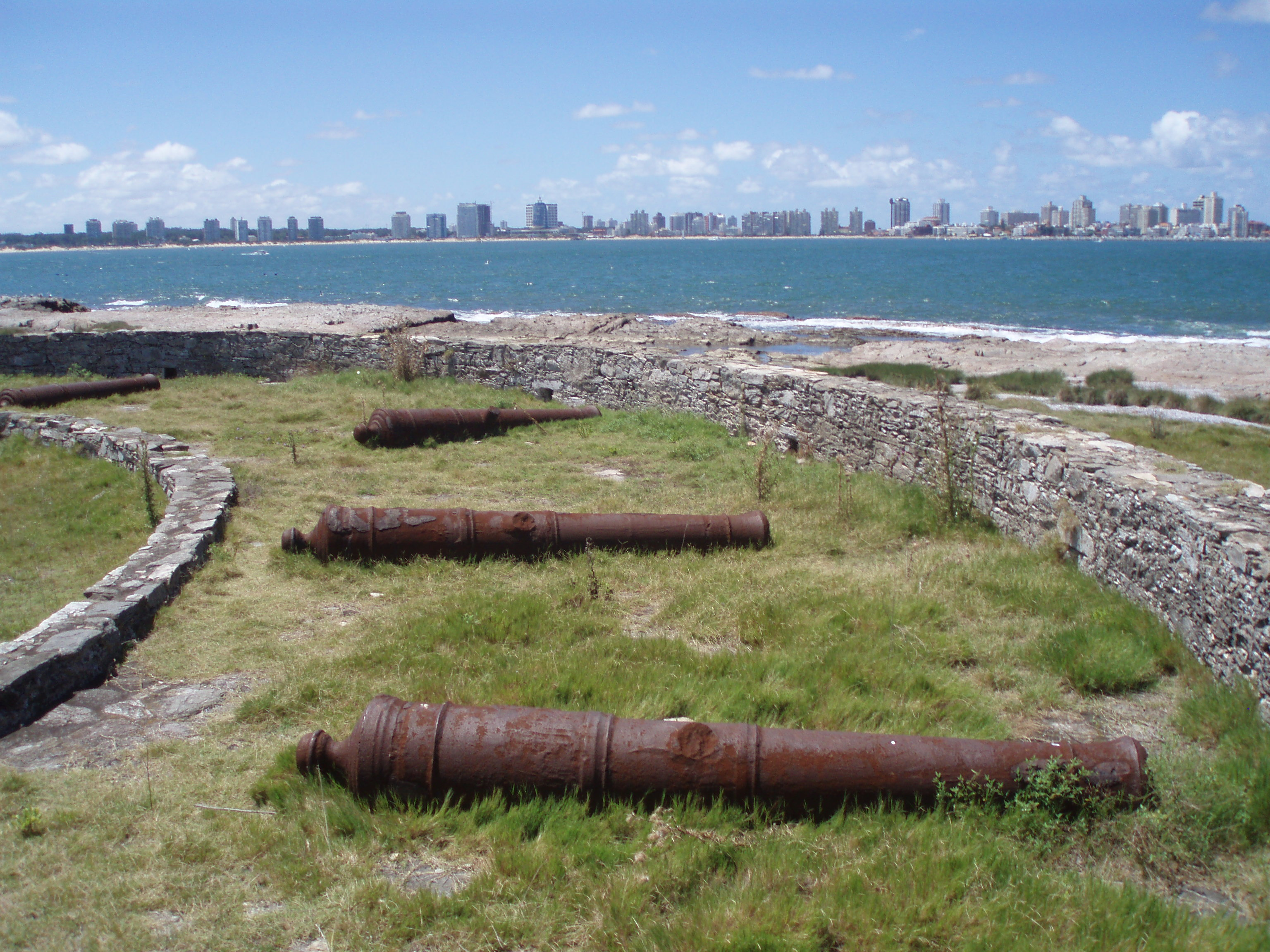 bateria este de isla gorriti